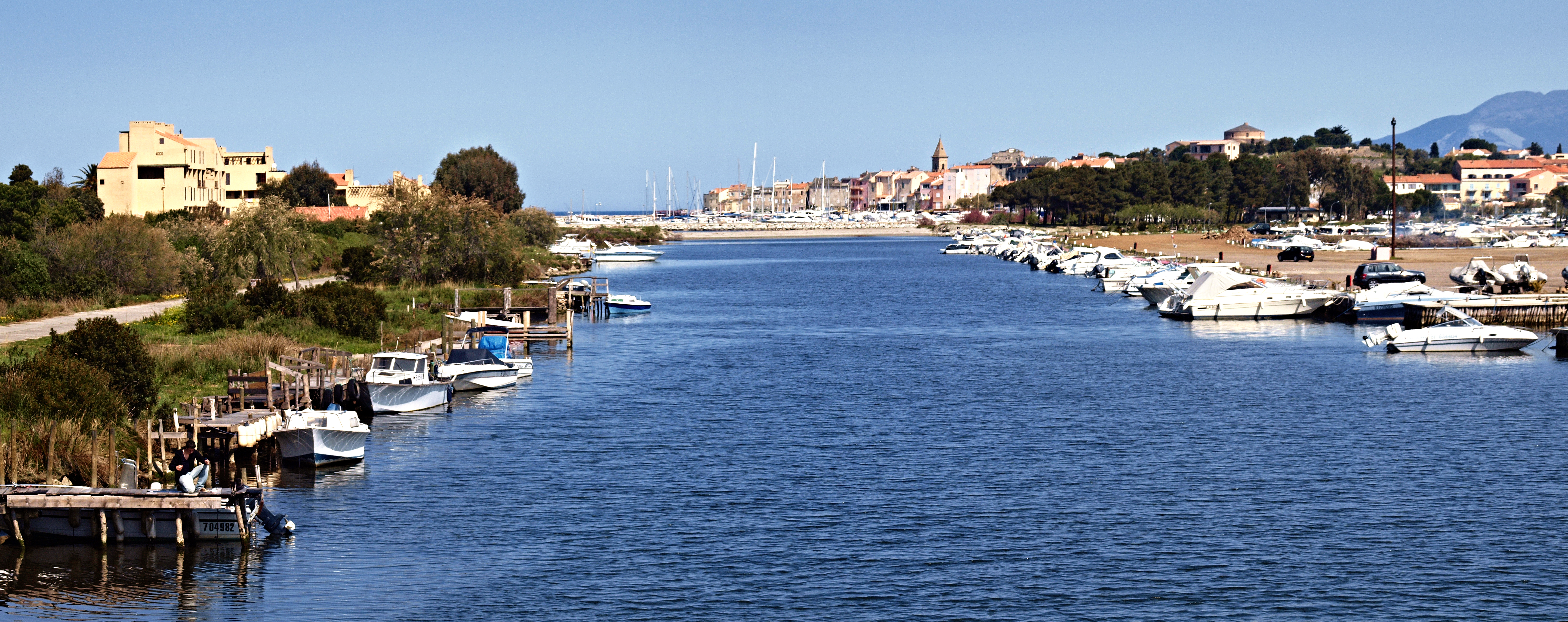 Saint-Florent (Corsica) - Embouchure de l'Aliso au port de plaisance